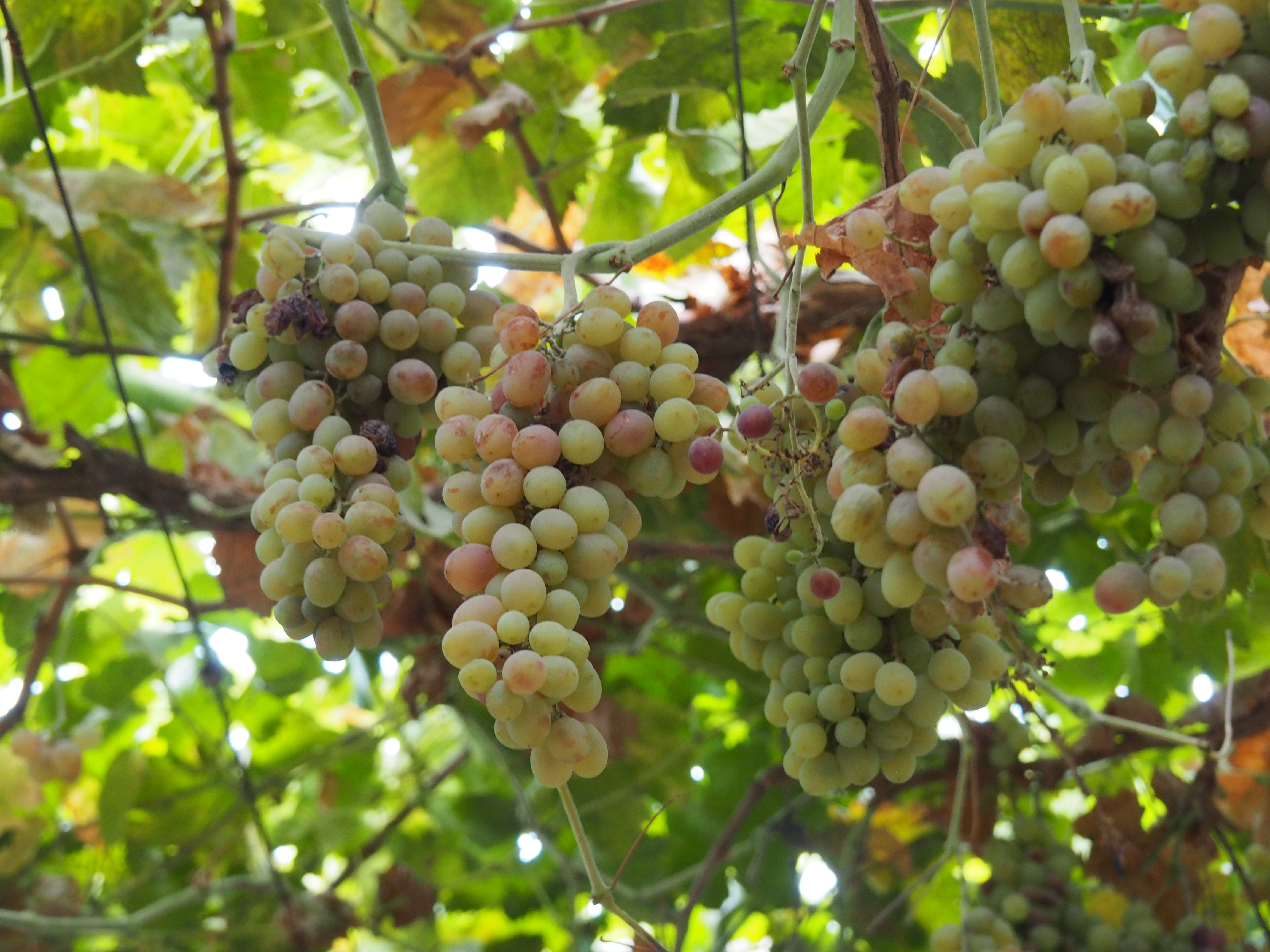 Turpan